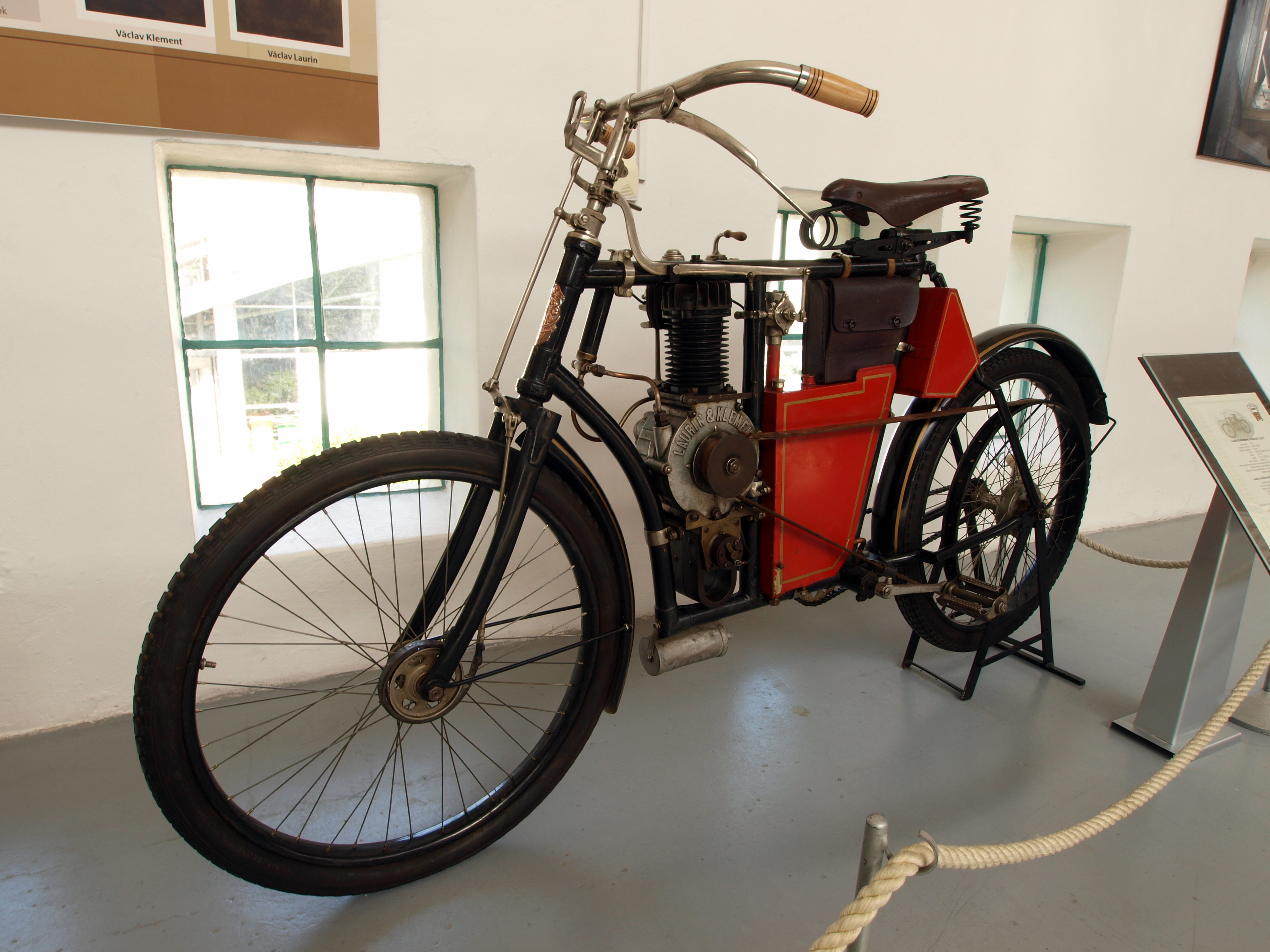 1903 Laurin & Klement, motorcycle type B .